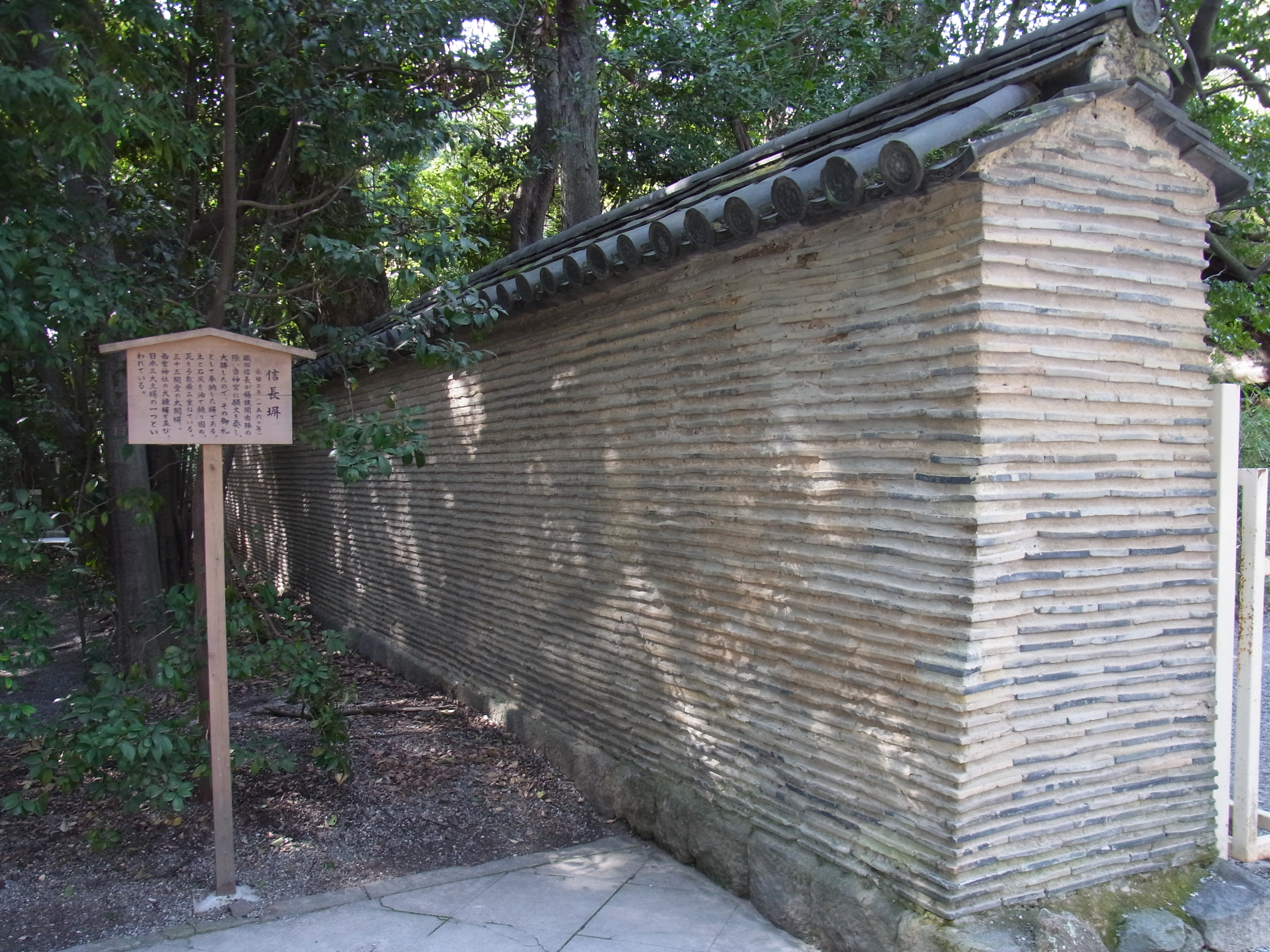 熱田神宮信長塀